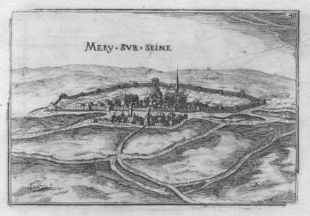 dans le document Gouvernement de champagne, des gravures qui étaient la possession de Davanne-Chappier avec comme notation 1499-1892, la vue n° 48 de la ville Mery sur Seine.